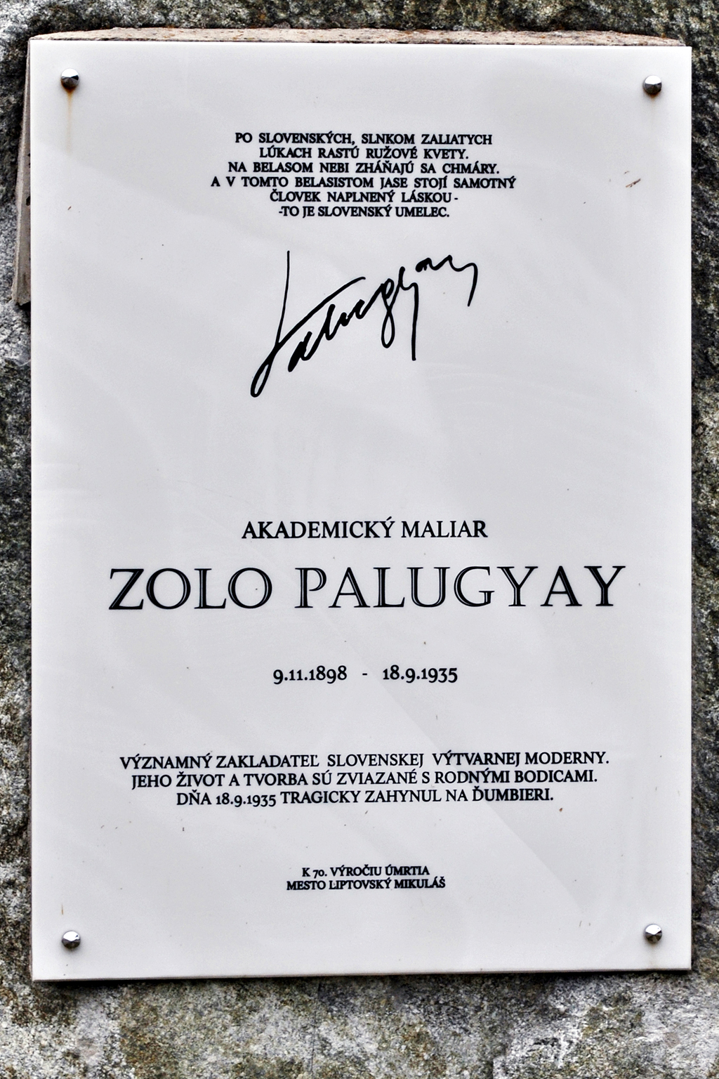 Tabuľa venovaná zakladateľovi slovenskej moderny akademickému maliarovi Zolovi Palugyayovi